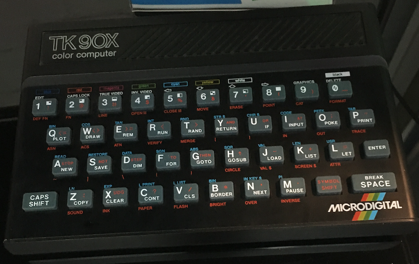 Klone des Sinclair Spectrum